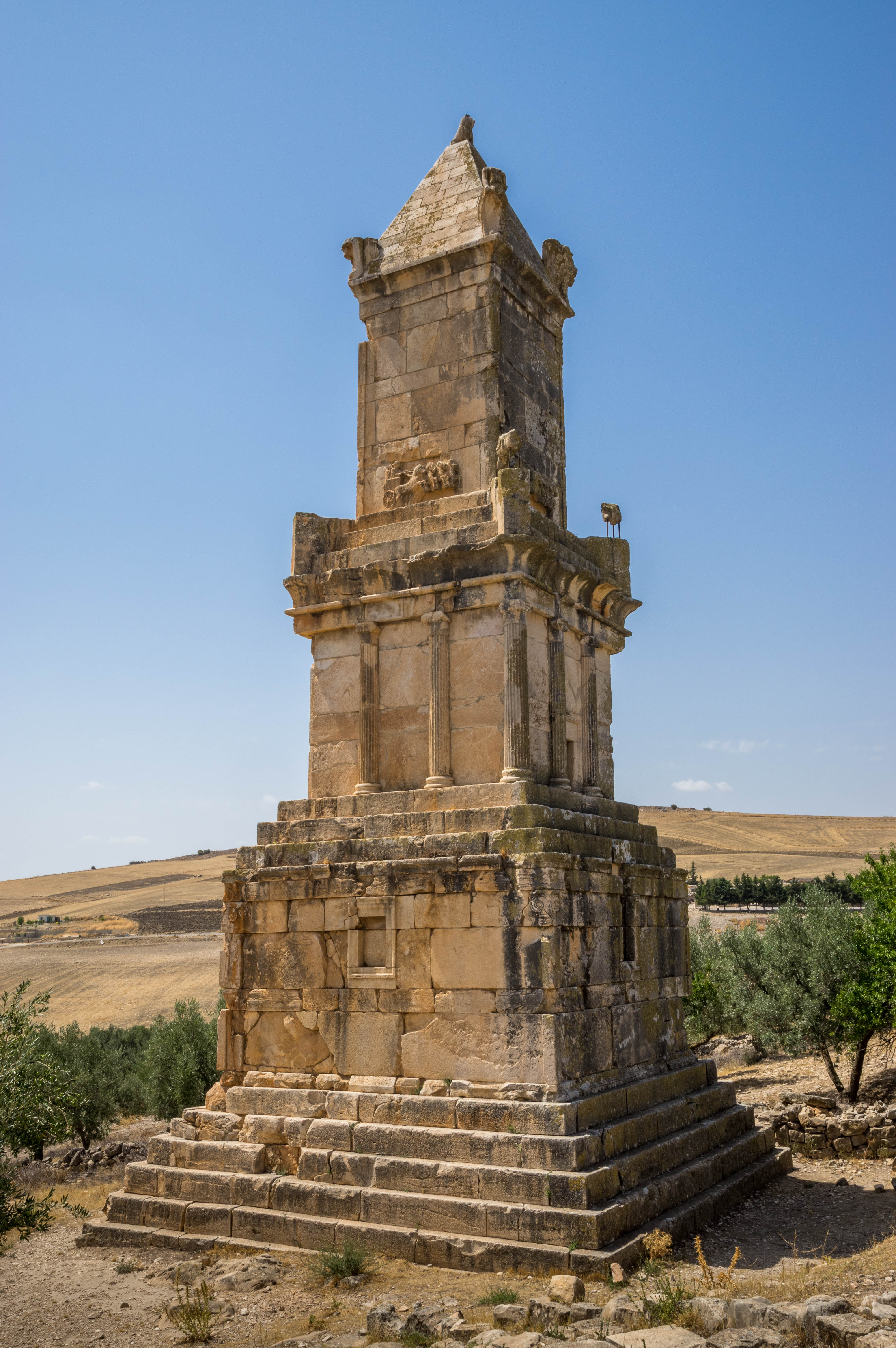 Grand mausolée